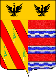 Stemma della famiglia Porro-Lambertenghi